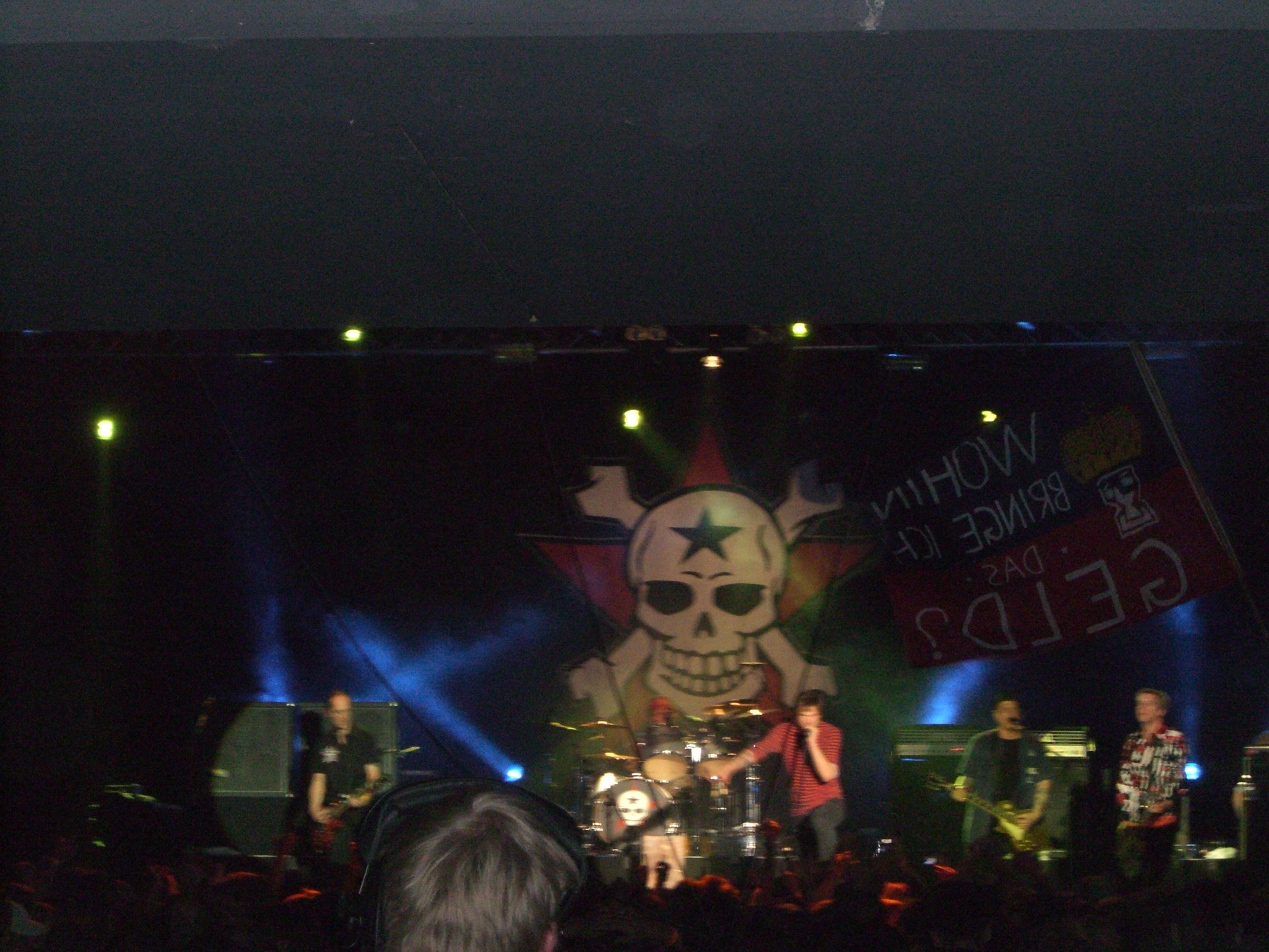 Konzert der Band Die Toten Hosen am 28. Mai 2008 in der Columbiahalle in Berlin